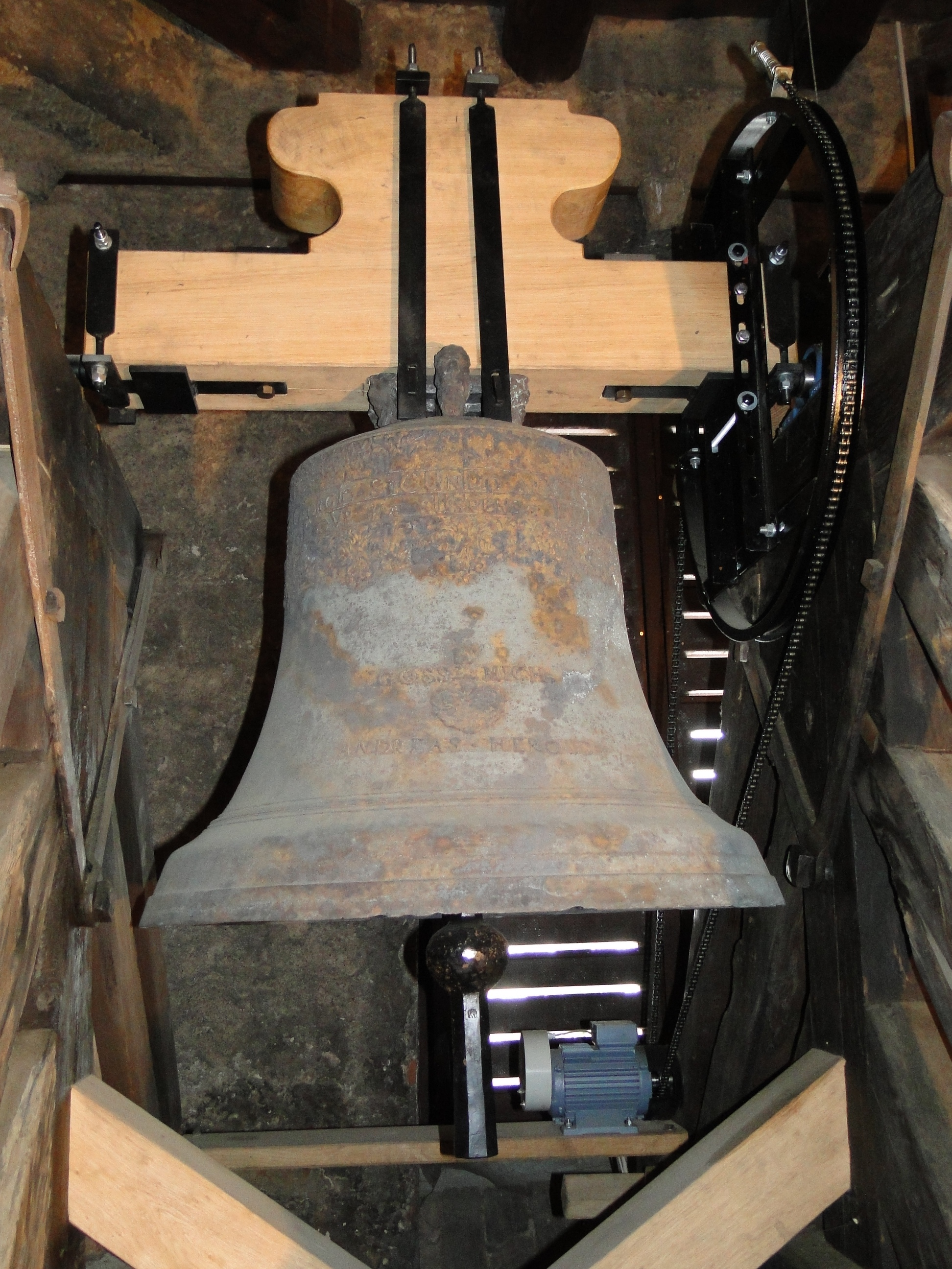 Die mittlere Glocke der Sophienkirche, heute Teil des Geläuts der Emmauskirche in Kaditz, gegossen von Andreas Herold